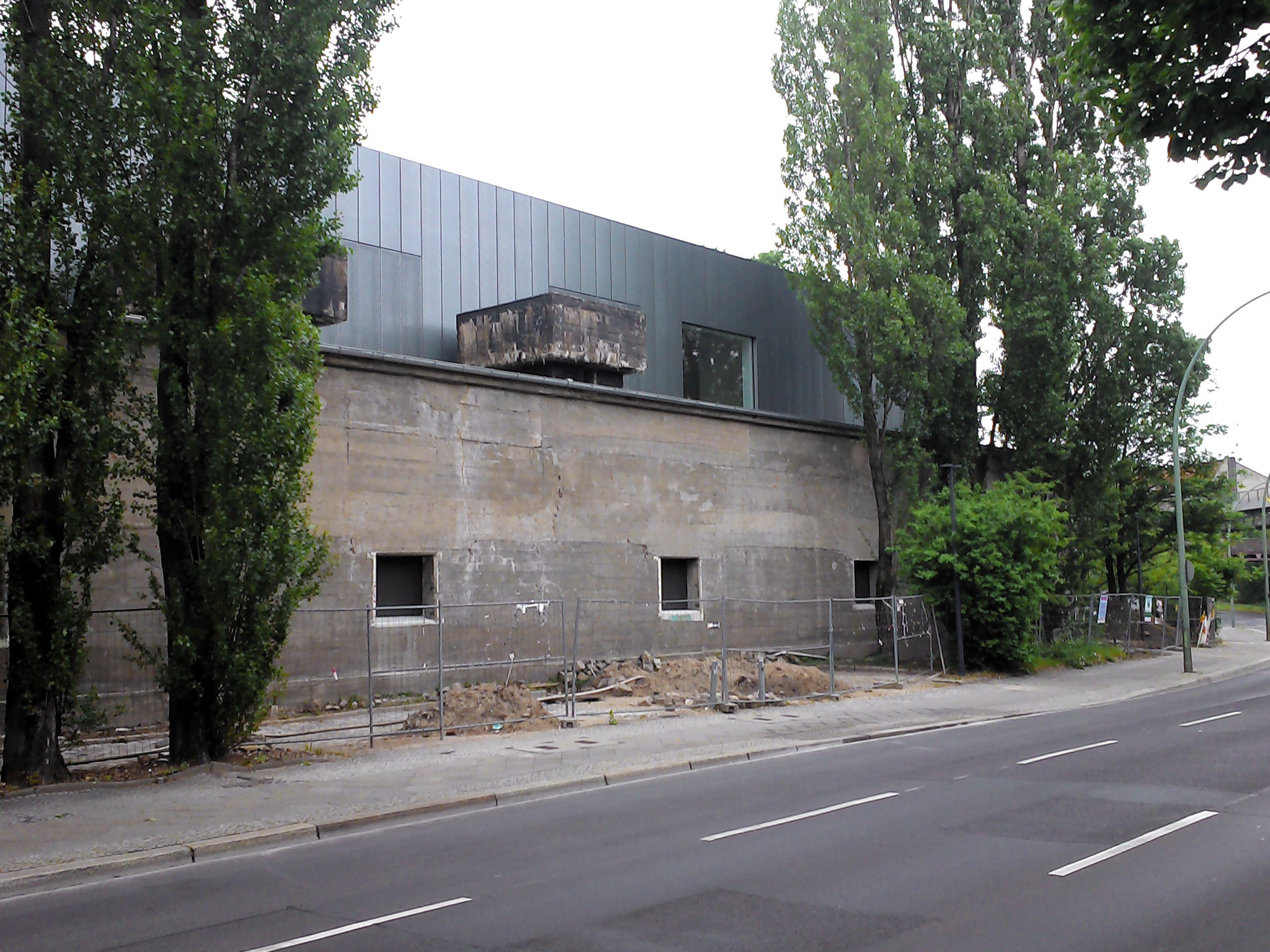 BASA Bunker Berlin (Fernmeldebunker bis 1945). Privater Aufbau durch Neubesitzer 2016.